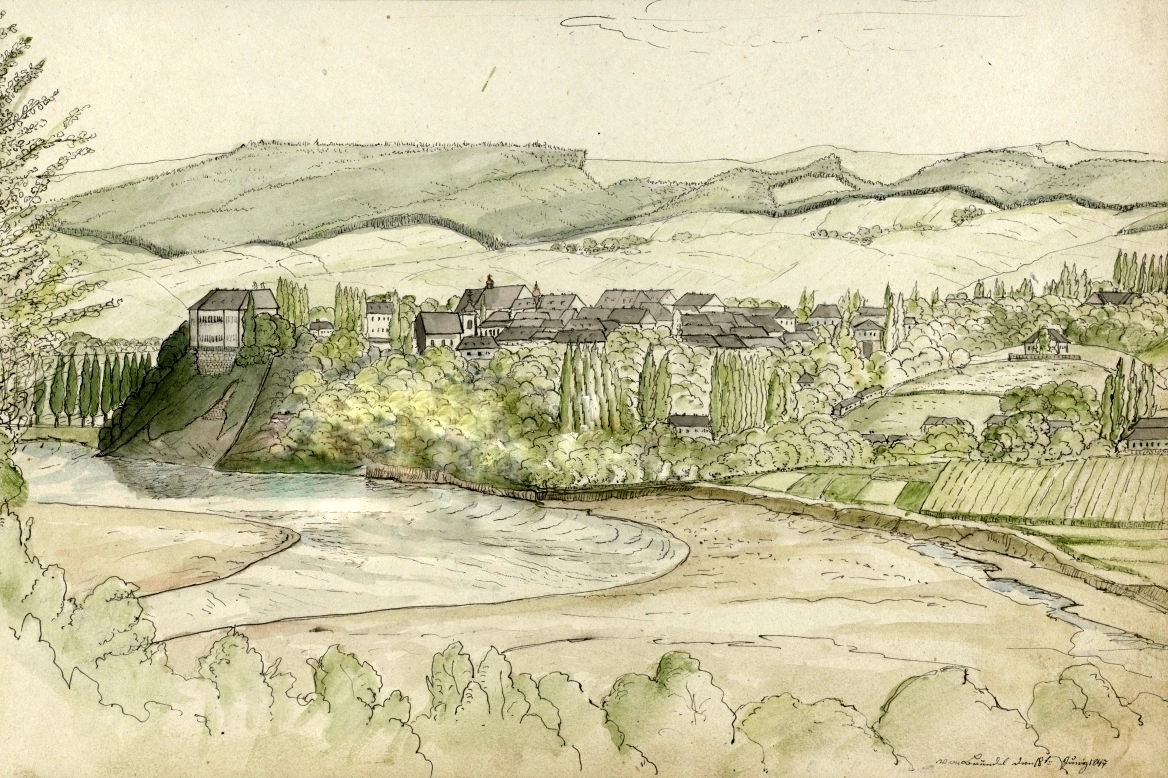 Zur Erinnerung an den Aufenthalt Seiner Kaiserlichen und Königlich Apostolischen Majestät Kaiser Franz Josef I. im Sanoker Schlosse am 31. October und 1. November 1851 - "Stadtansicht (von Norden) aus dem Jahre 1847"